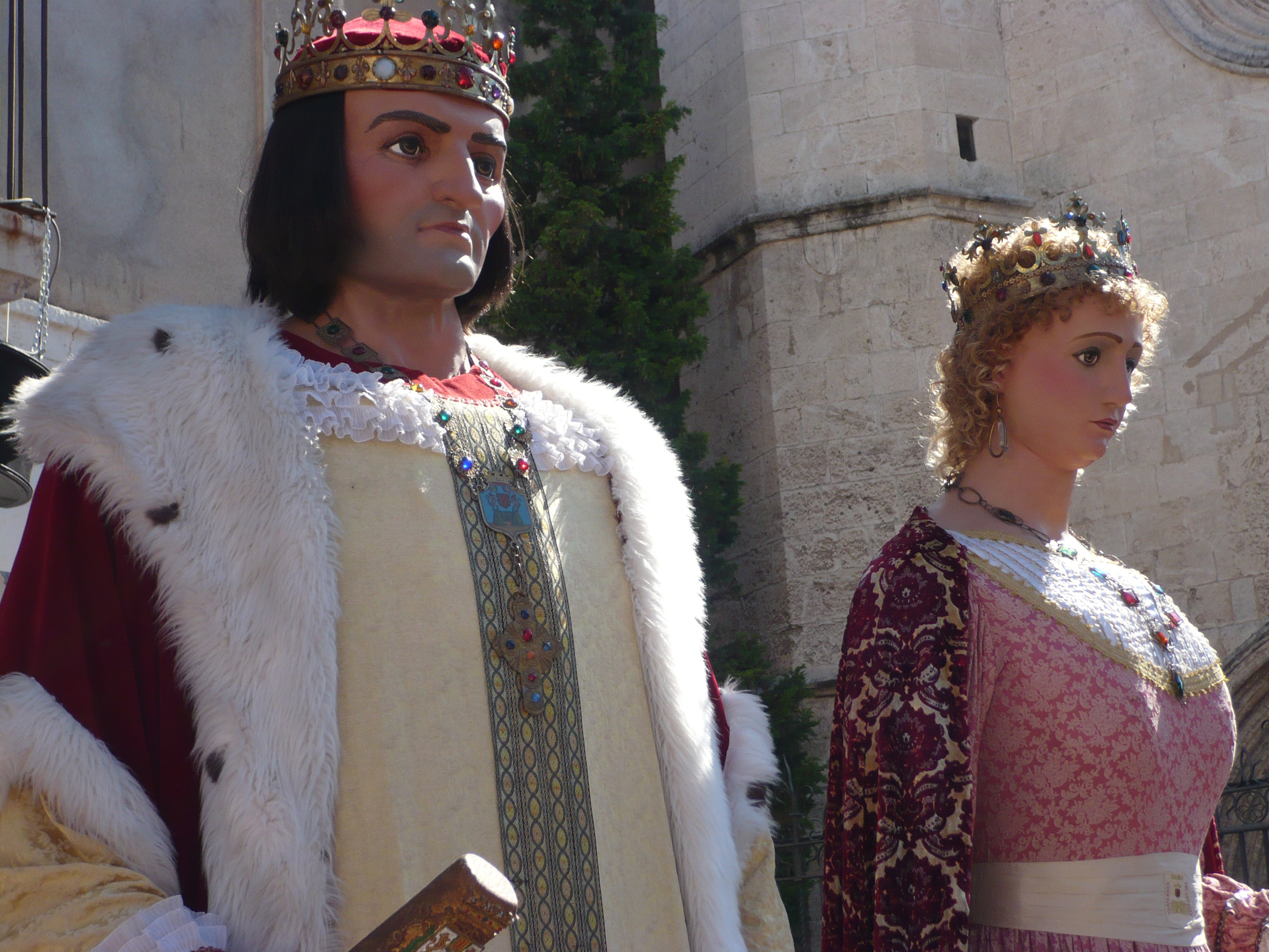 Gegants de Vilafranca del Penedès: Ferragut i Elisenda